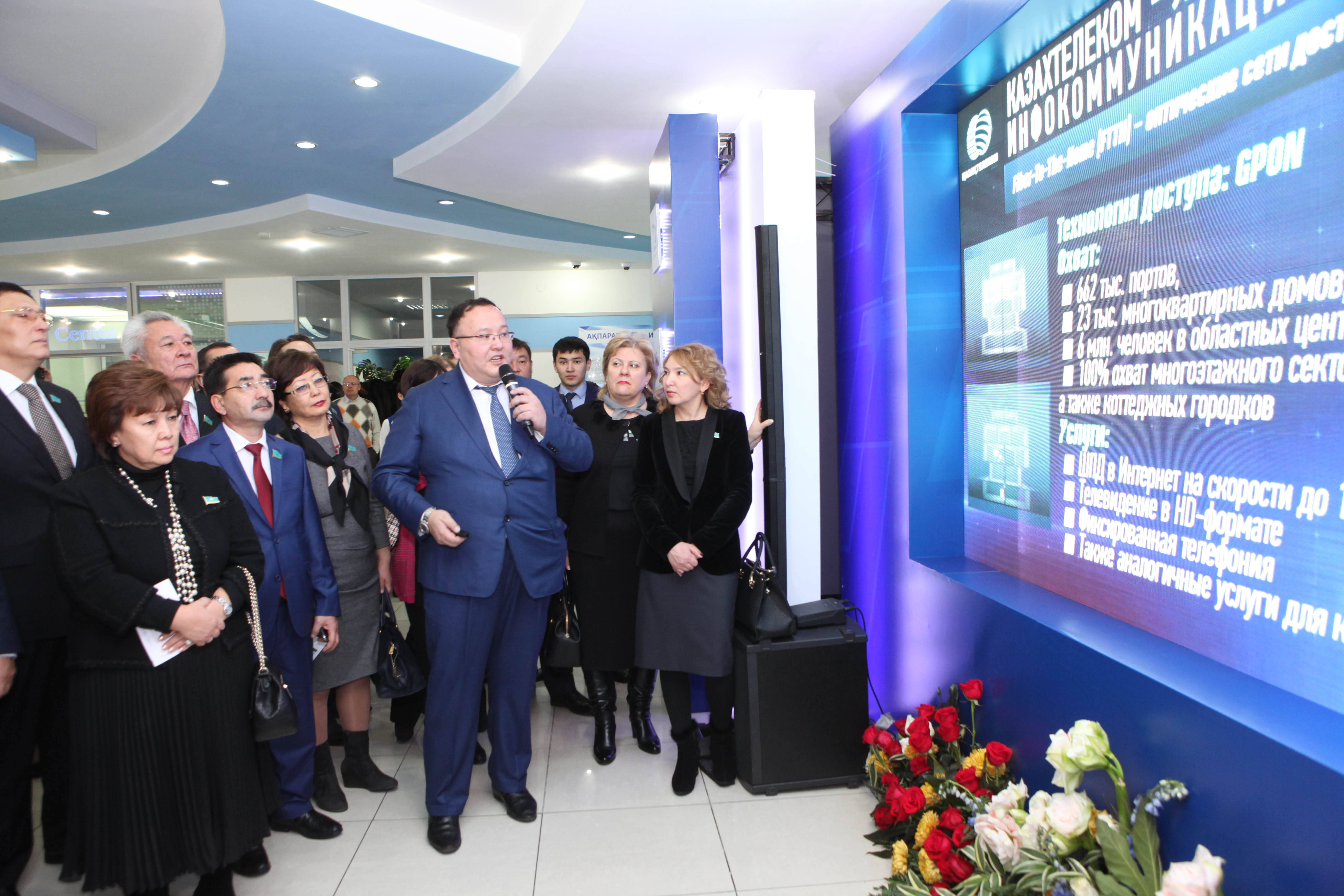 Встреча с депутатами